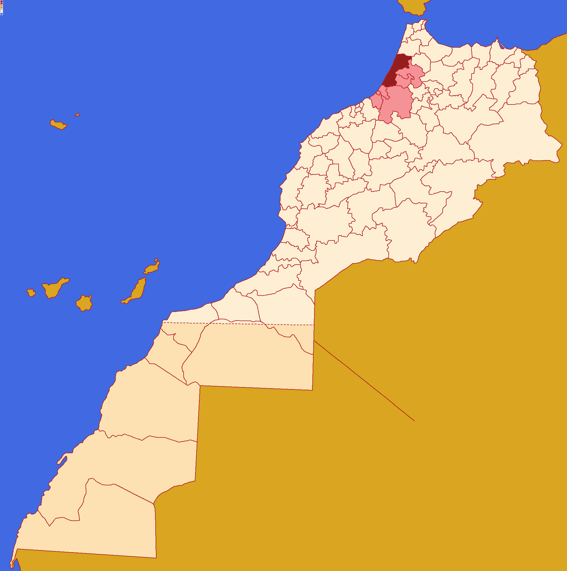 Localização da província de Quenitra dentro da região de Rabate-Salé-Quenitra e dentro de Marrocos. Conforme a reforma administrativa de 2015.